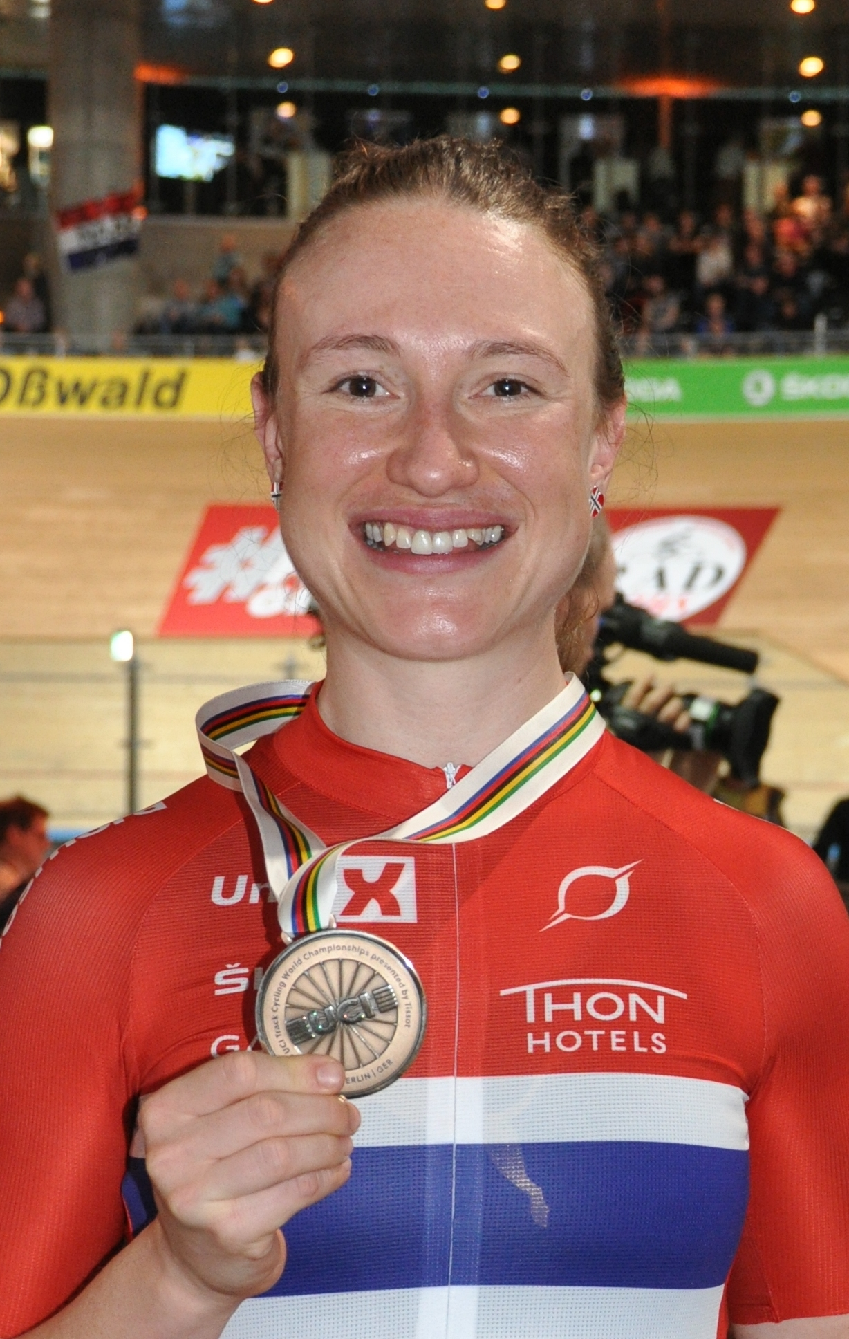 Anita Stenberg, Radsportler aus Norwegen - Bronze im Punktefahren